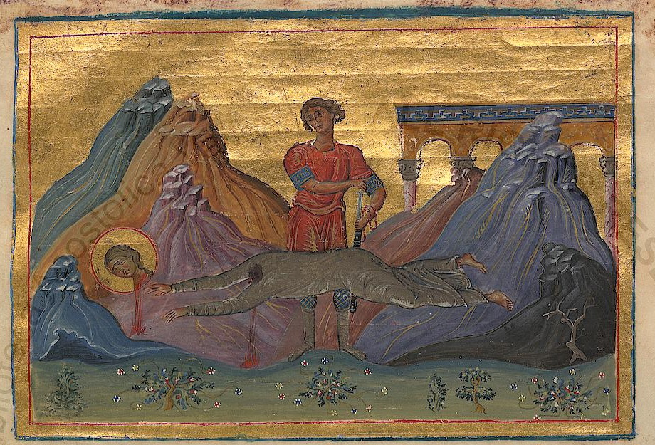 Мц. Ермиония. Миниатюра из Минология Василия II. 976-1025 гг. (Vat. gr. 1613. Fol. 12) From story of St. Hermione, Menologium of Basil II, c.1000